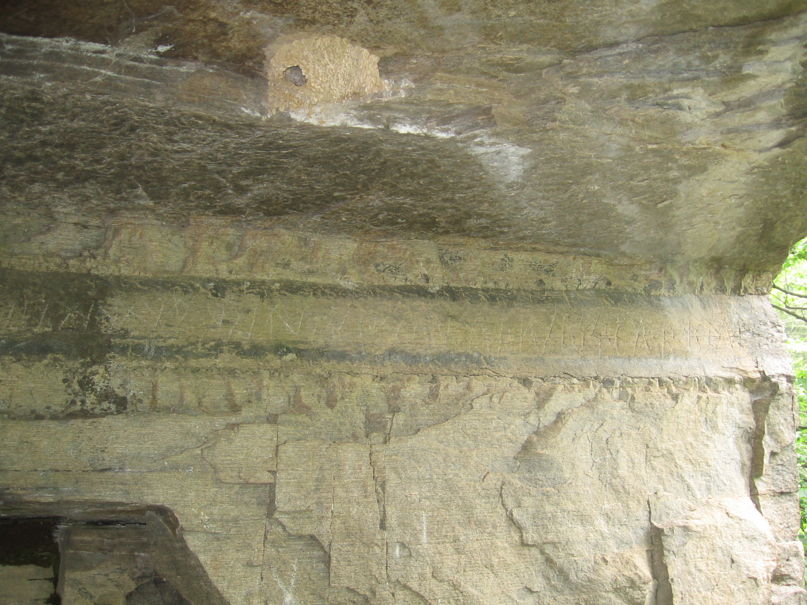 Това е снимка на Ситовския надпис от август 2007